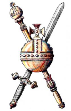 Koninklijk distinctief